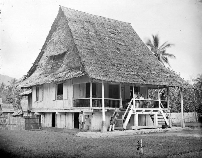 Negatief. Woning met rieten dak